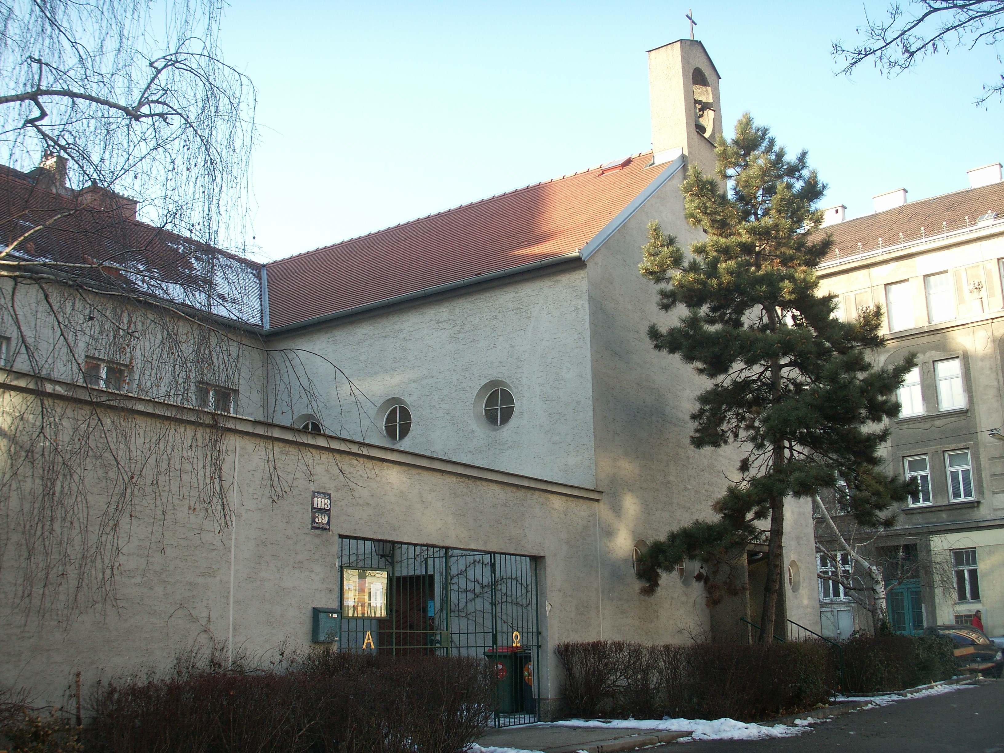 Zwinglikirche in Wien, 15. Bez., Schweglerstraße 39